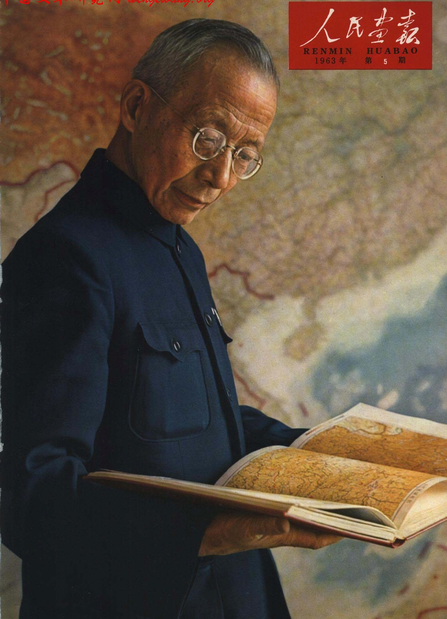 1963-05 1963年 竺可桢